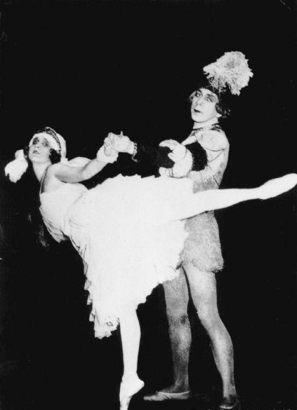 Балерина Мари Пайчева и хореограф Георг Ге